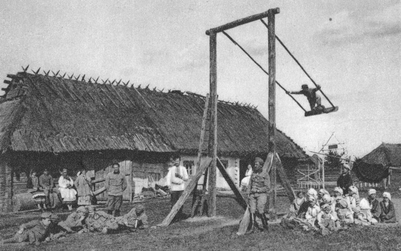 Na huśtawce w 2 pułku ułanów Legionów Polskich w Gradysku. Długie stacjonowanie na Wołyniu pozwoliło legionistom na rozbudowanie swojej tymczasowej infrastruktury, jak też zbliżenie z miejscową ludnością. Wybudowana przez nich huśtawka służyła zarówno żołnierzom, jak i okolicznym dzieciom.